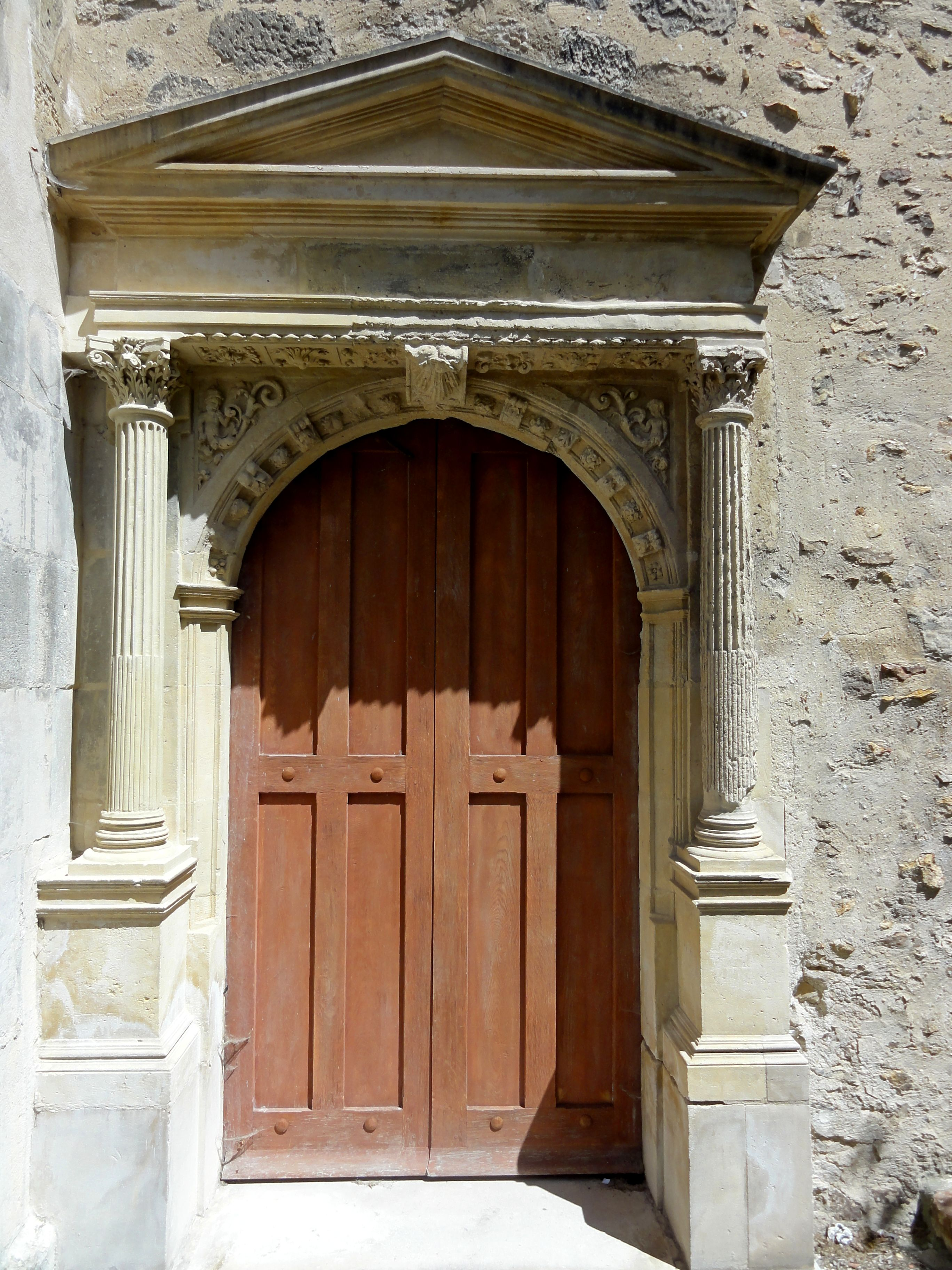 Portail du croisillon sud.